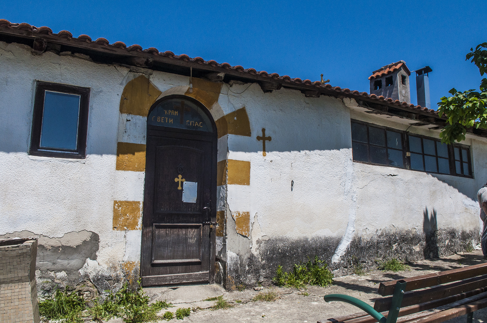 Црква Свети Спас - Добри Дол, има интересна внатрешност со стари фрески и икони